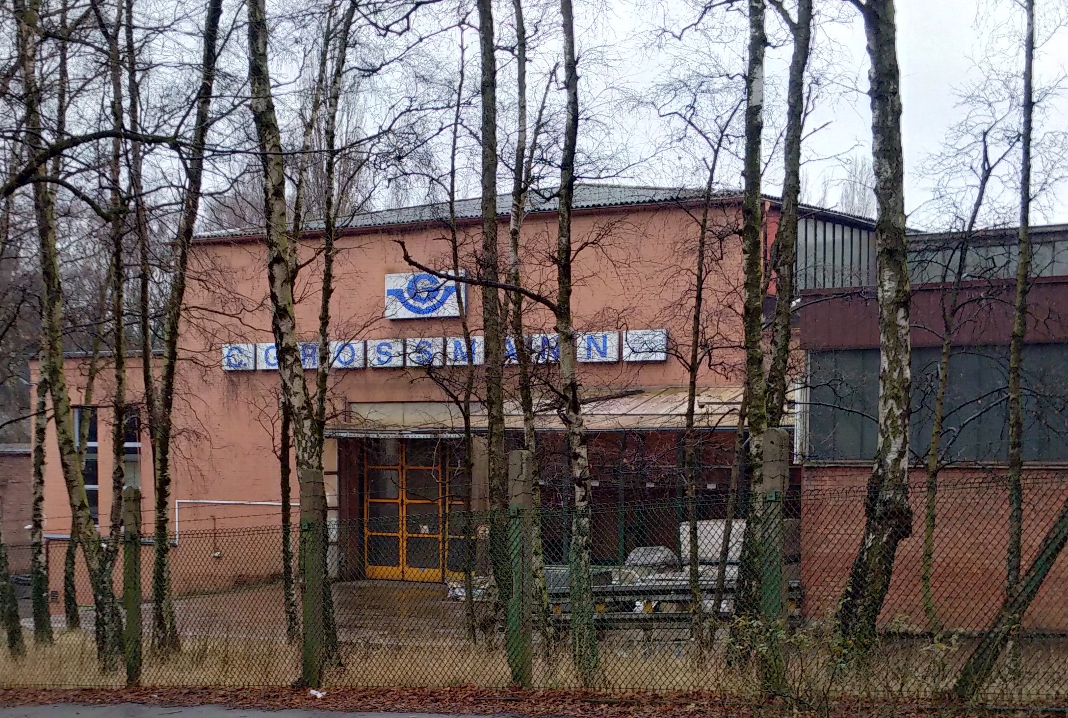 Werk von Grossmann an der Solinger Böcklinstraße, aufgenommen im Winter 2016/2017